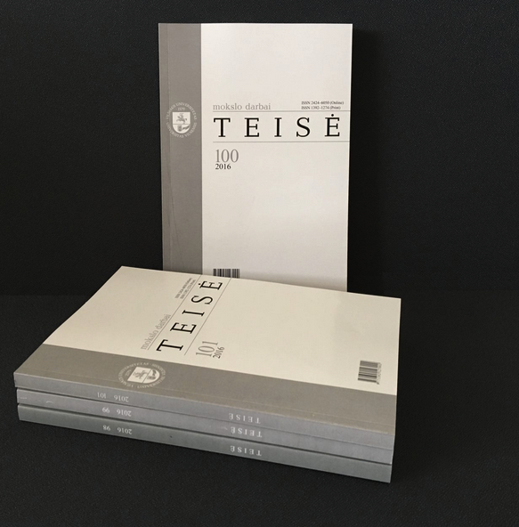 Vilniaus universiteto Teisės fakulteto žurnalas „Teisė""